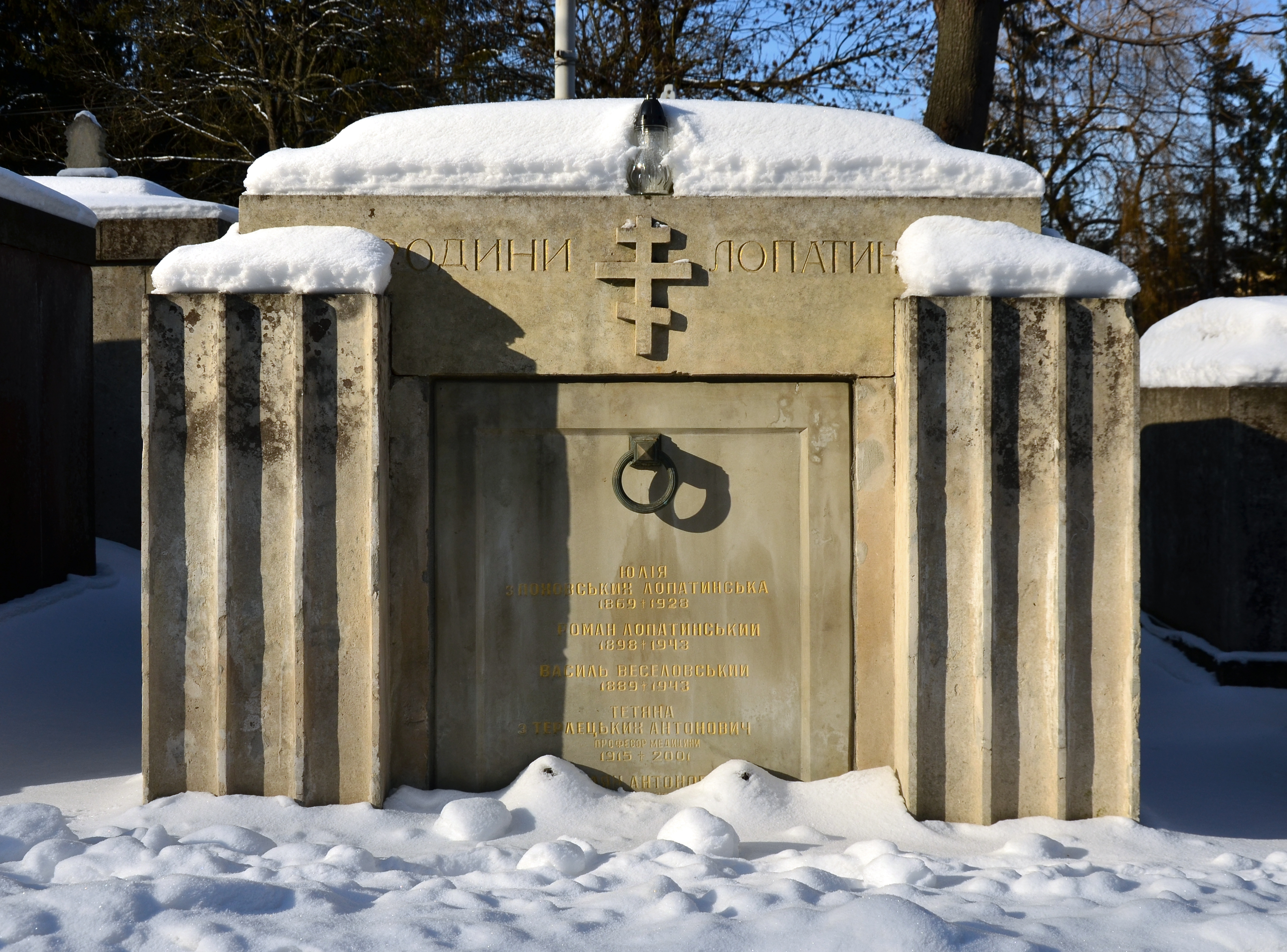 Гробівець Лопатинських на Личаківському цвинтарі у Львові.